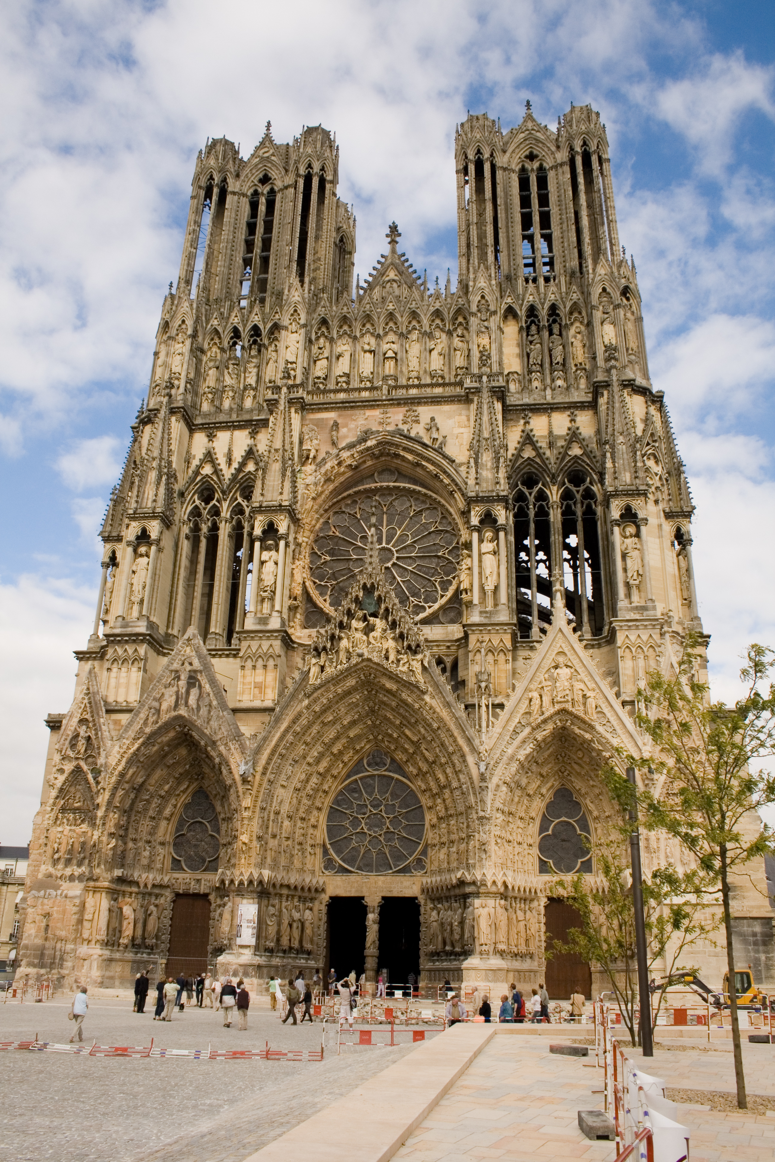 Facade de la Cathédrale de Reims, prise depuis le parvis